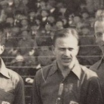 Dick Sigmond voor de interland tegen Frankrijk.